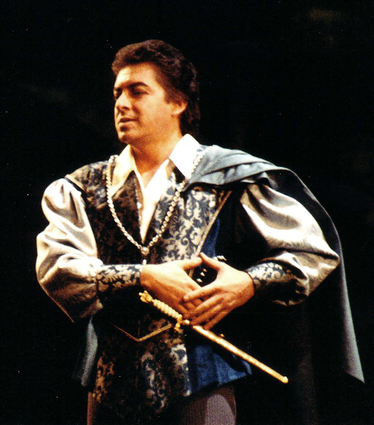 Operasinger Francisco Araiza as Romeo